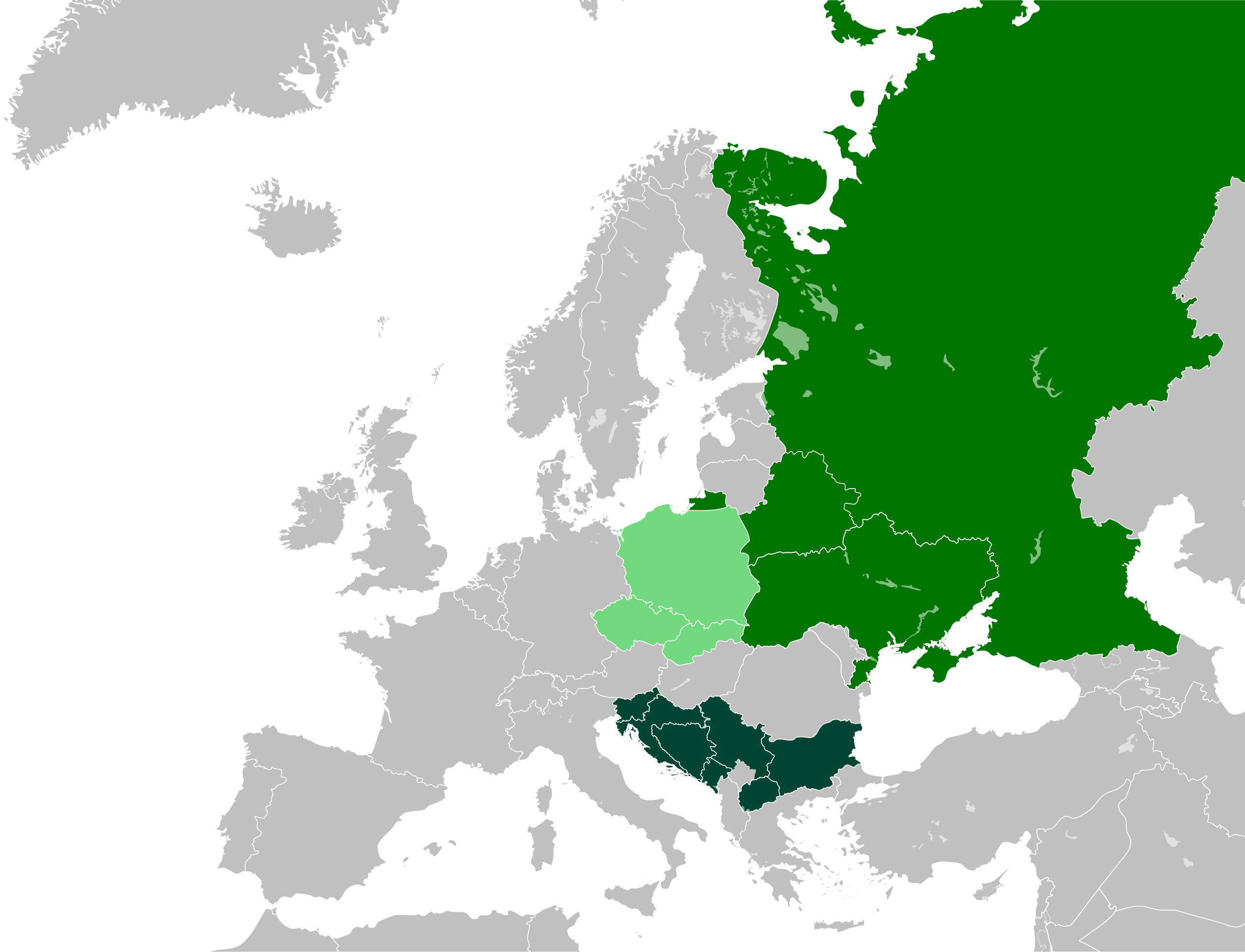 نقشه زبان های اسلاوی برپایه رسمیت داشتن در هر کشوری